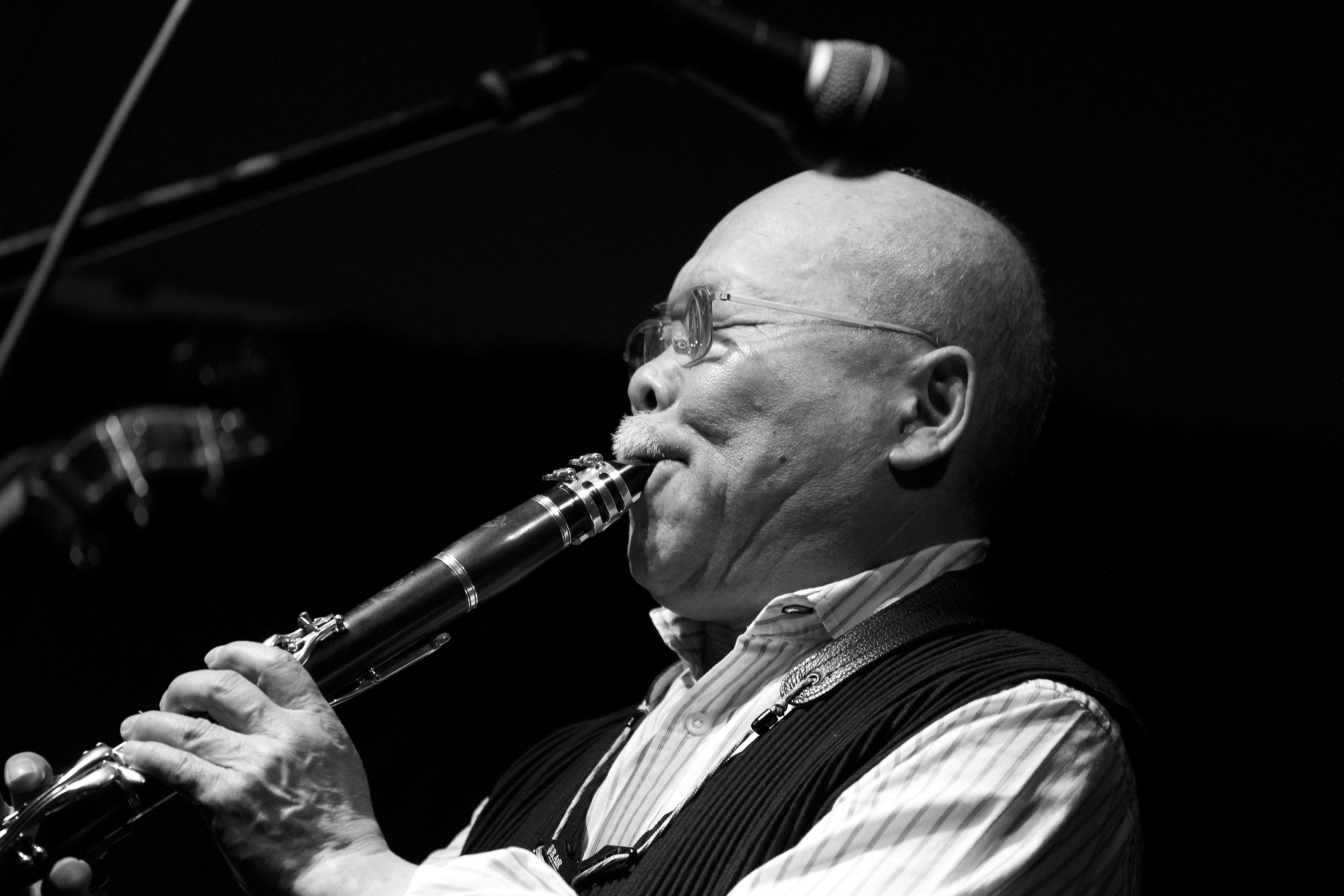 Das Arashi Trio (dt: Sturm) sind Johan Bertling (db), Paal Nilssen-Love (dr) & Akira Sakata (sax, cl, voc). Hier der Auftritt im Club W71 in Weikersheim.